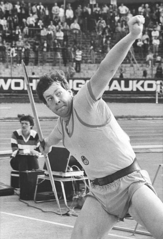 Uwe Hohn ADN-ZB Kluge 03.06.1984 Erfurt: 26.DDR-Meisterschaften in der Leichtathletik-DDR-Meister im Speerwurf der Männer wurde Uwe Hohn (ASK Vorwärts Potsdam) mit der Weite von 93,80 Metern im 6. Versuch.